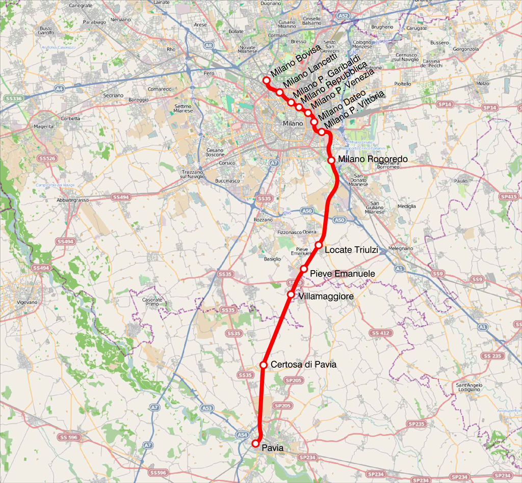 Mappa della linea S13 del servizio ferroviario suburbano di Milano